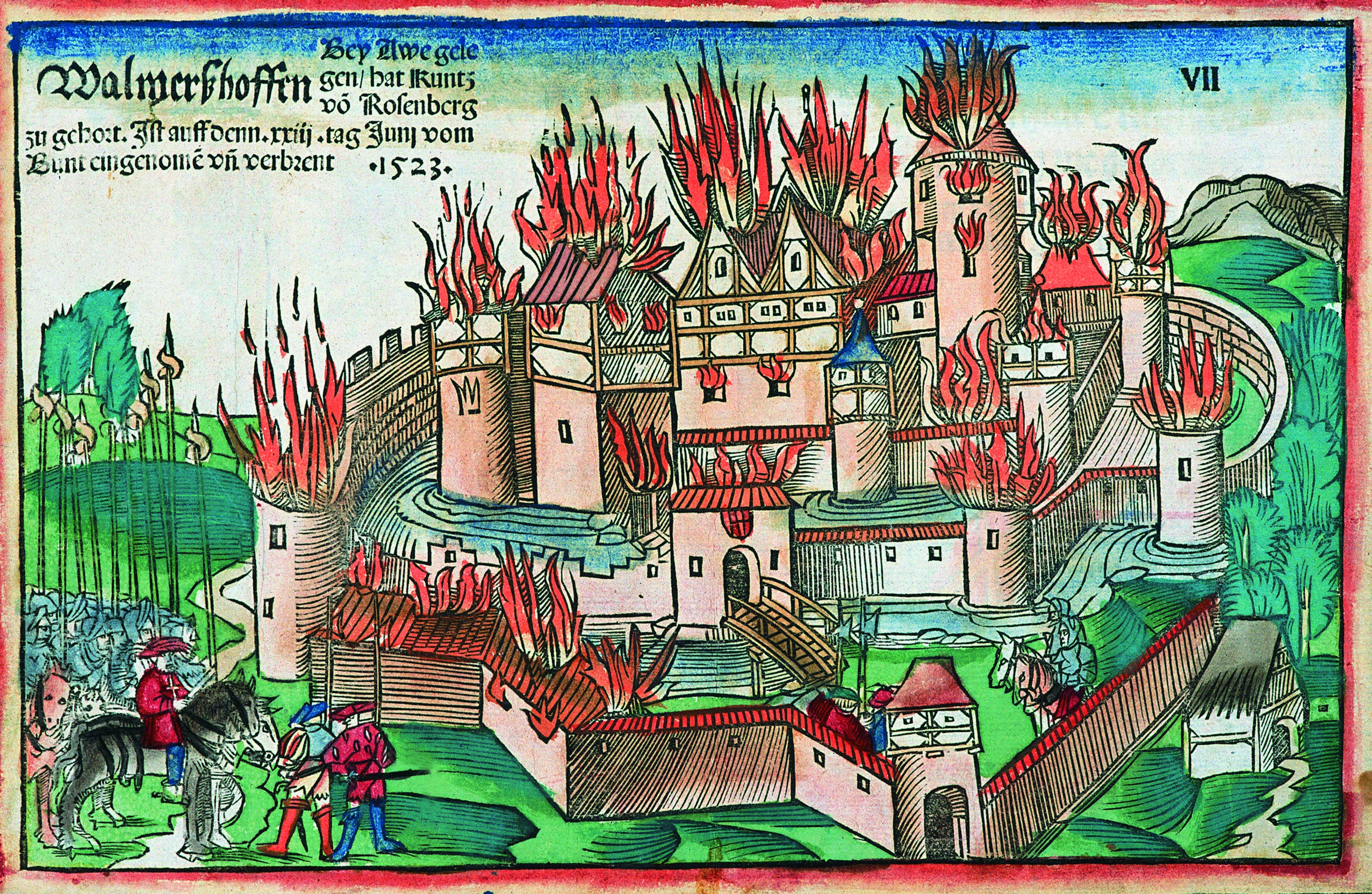 Bild aus dem Burgenbuch der Staatsbibliothek Bamberg, Staatsbibliothek Bamberg, RB.H.bell.f.1